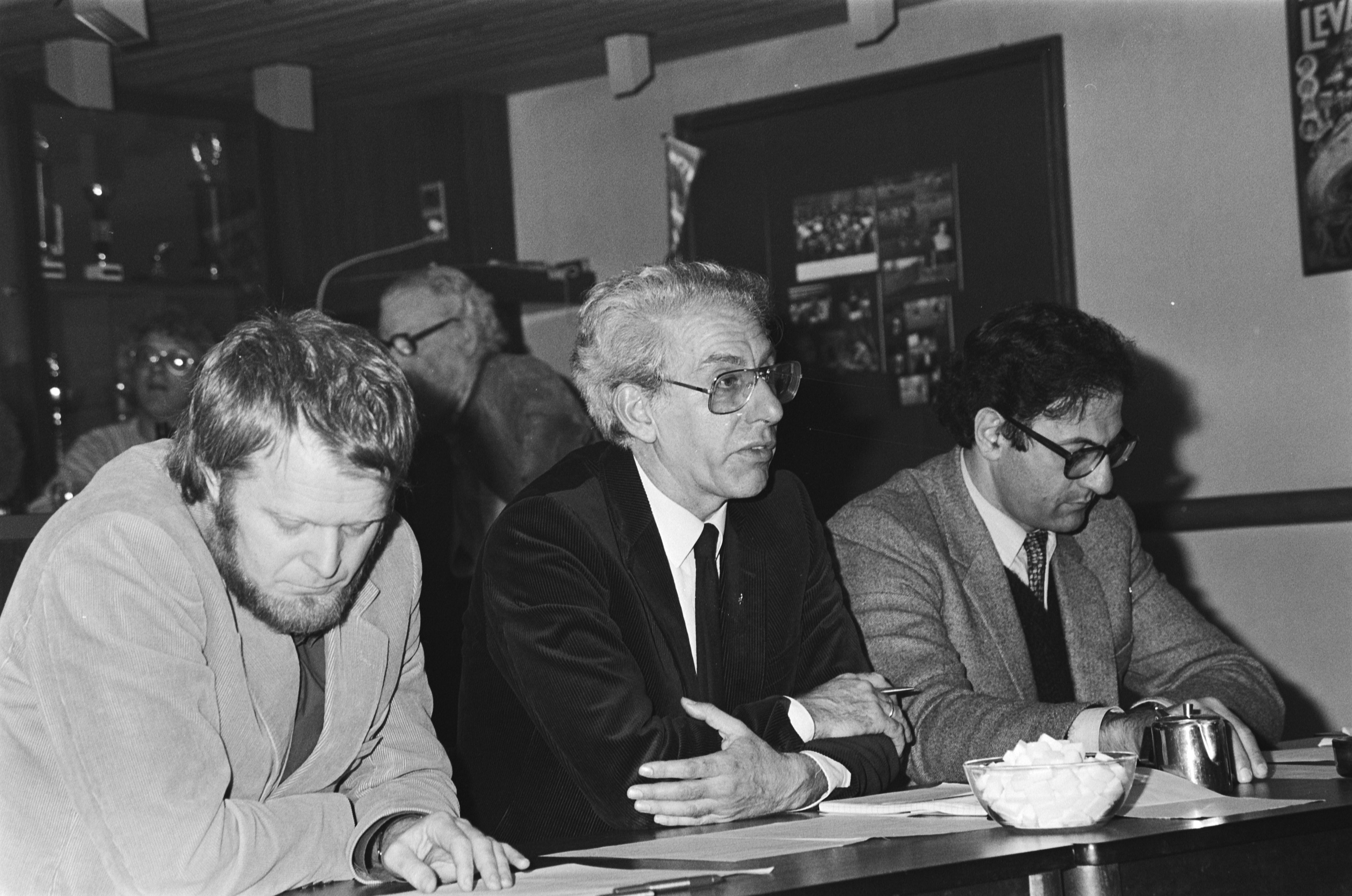 Collectie / Archief : Fotocollectie Anefo Reportage / Serie : [ onbekend ] Beschrijving : Persconferentie in verband met Amnesty International congres in Noordwijk in Carre. Jose Zalaquelt , Peter Baehr en Thomas Hammarberg Datum : 2 mei 1982 Locatie : Noordwijk Trefwoorden : congressen, persconferenties Persoonsnaam : Amnesty International, Peter Instellingsnaam : Carré Fotograaf : Dijk, Hans van / Anefo Auteursrechthebbende : Nationaal Archief Materiaalsoort : Negatief (zwart/wit) Nummer archiefinventaris : bekijk toegang 2.24.01.05 Bestanddeelnummer : 932-1351